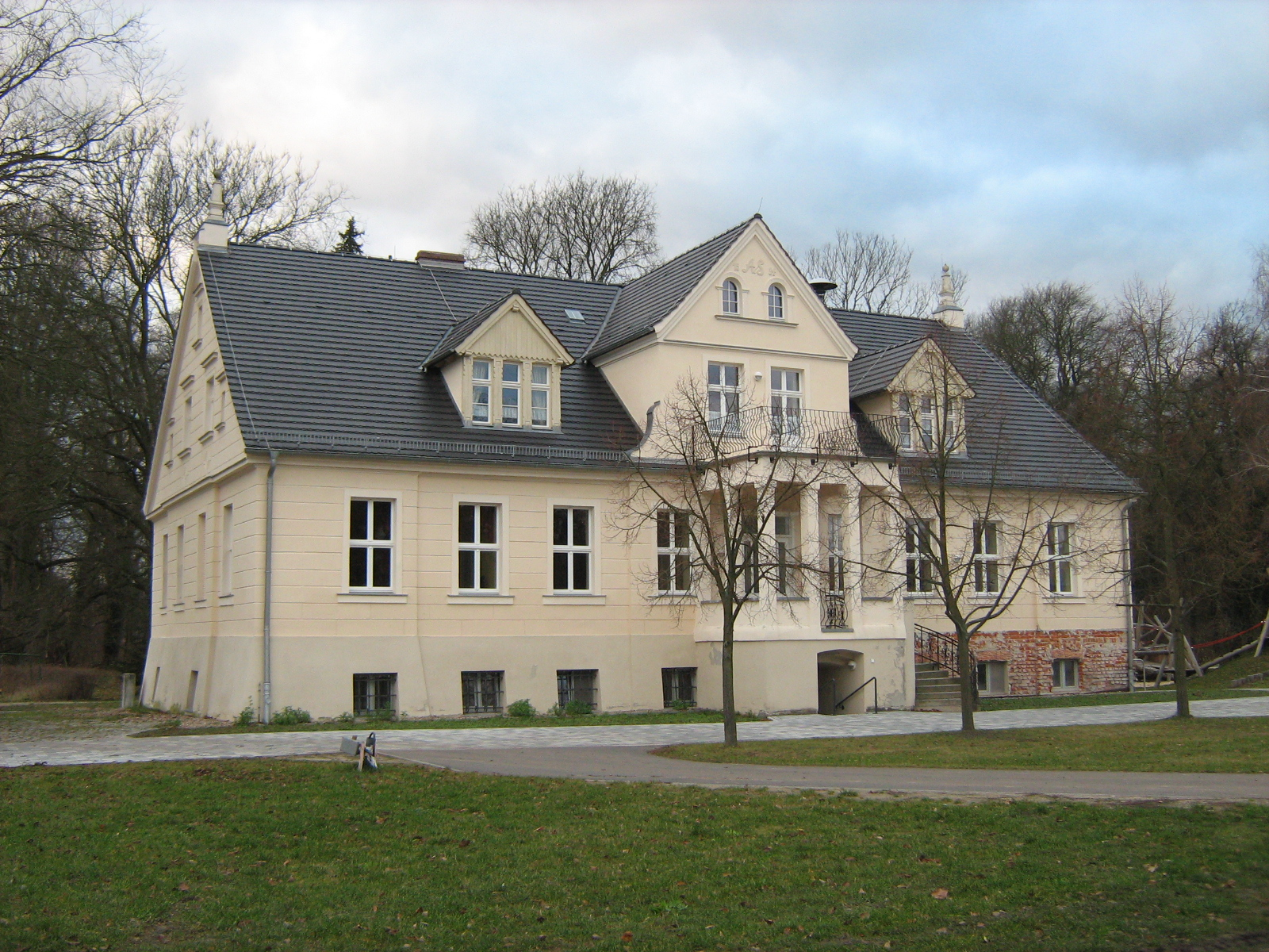 Gutshaus von Krügersdorf, Beeskow-Krügersdorf, Brandenburg, Deutschland. – Die Gutsherren von Krügersdorf waren im Mittelalter die Herren von Grosse. Im Jahre 1534 wird Hans von Steinkeller, der zeitweilig auch Hauptmann von Beeskow war, mit dem Dorf und Gut belehnt. Diese Jahreszahl steht noch heute in der Spitze des Erkers. Die Familie von Steinkeller saß bis ins 18. Jahrhundert auf Krügersdorf.